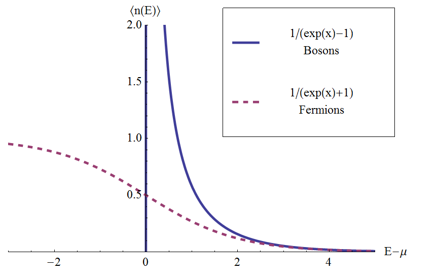 Plot der Besetzung für Bose-Einstein- und Fermi-Dirac-Statistik